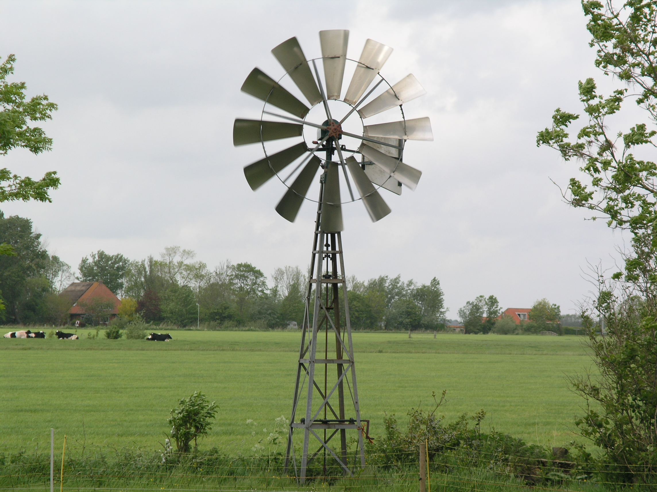 Sijbrandahuis Windmotor